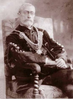 Kövesligethy Radó csillagász, geofizikus, a Magyar Tudományos Akadémia tagja.